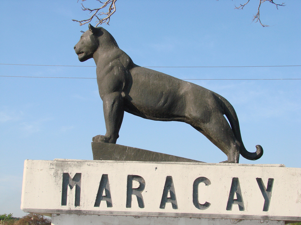 Símbolo y signo de los Indios Maracaya.